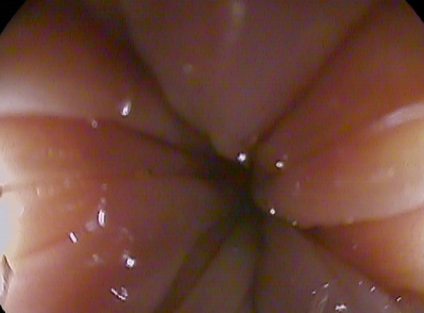 大腸内視鏡でみる肛門